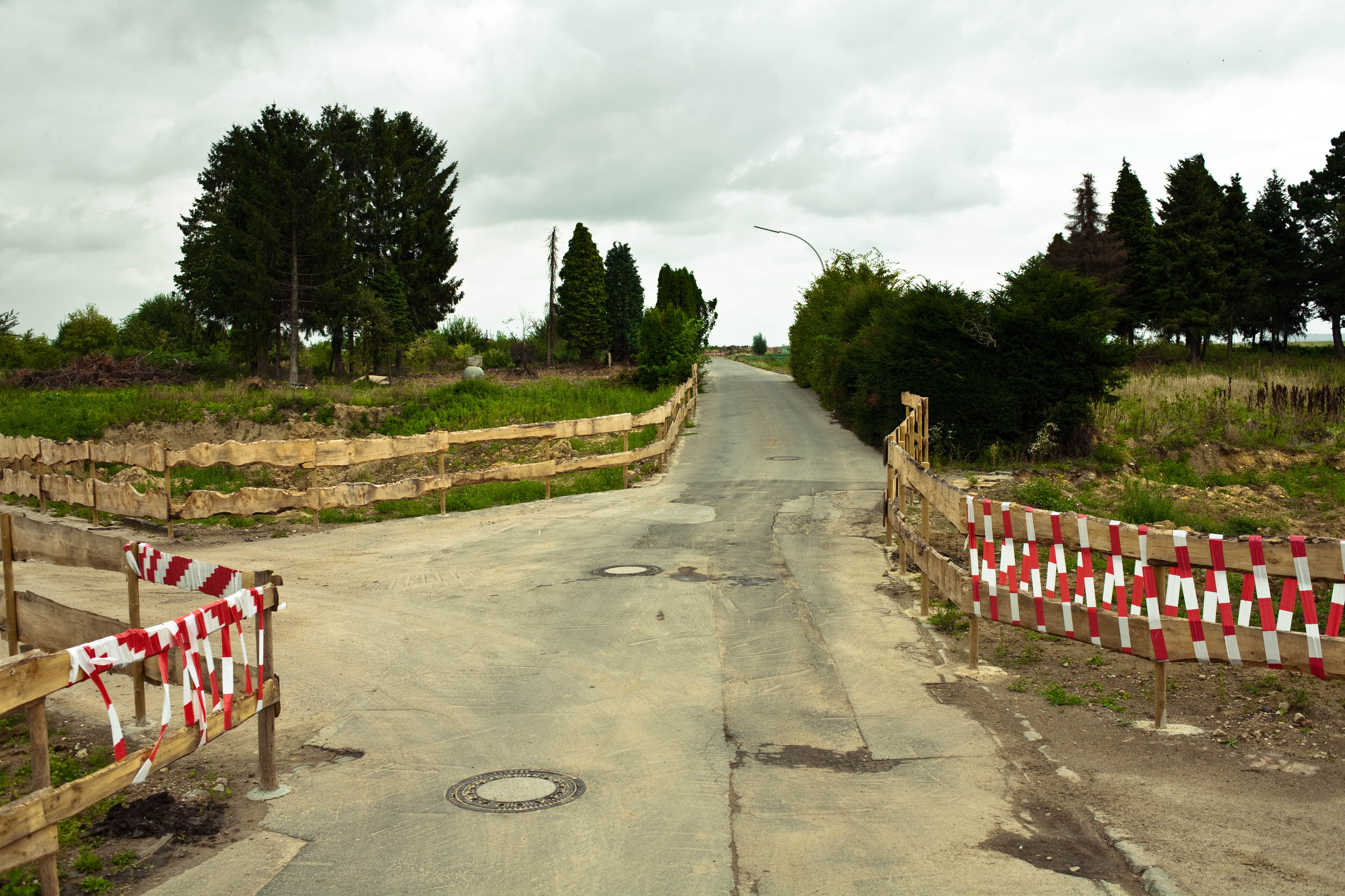 Spenrath, Standpunkt von ehemals „An de Luhr“